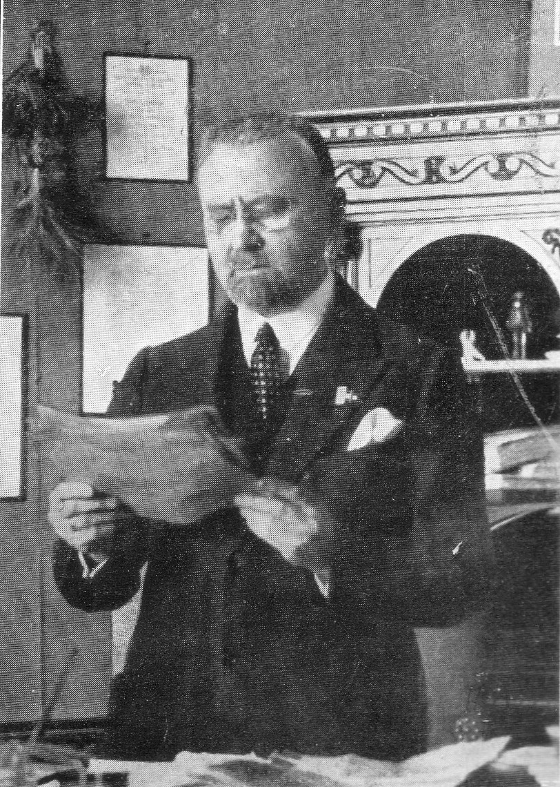 Giovanni Marinelli, 1926 (da L'Illustrazione italiana). Massone, fascista della prima ora, implicato nel delitto Matteotti, membro del Gran Consiglio tra quelli che votarono a favore dell'o.d.g. Grandi, fucilato a Verona.